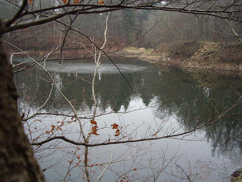 Kassel, Erlenloch im Habichtswald, v. N(?) (ca. 2003-12-18). / Noch ein wenig vereist. Recht im Hintergrund die Einfahrt in den ehem. Steinbruch.